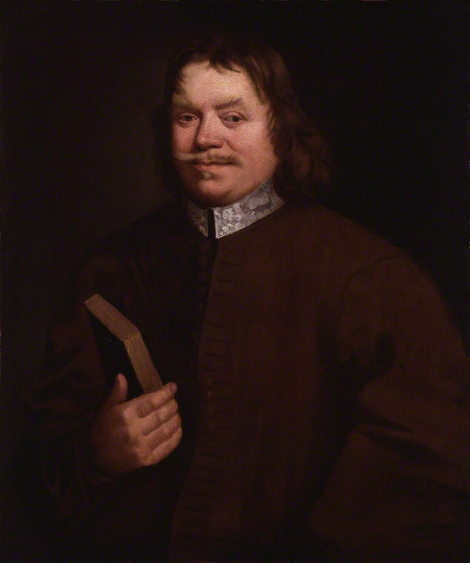 Portrait des Schriftstellers John Bunyan